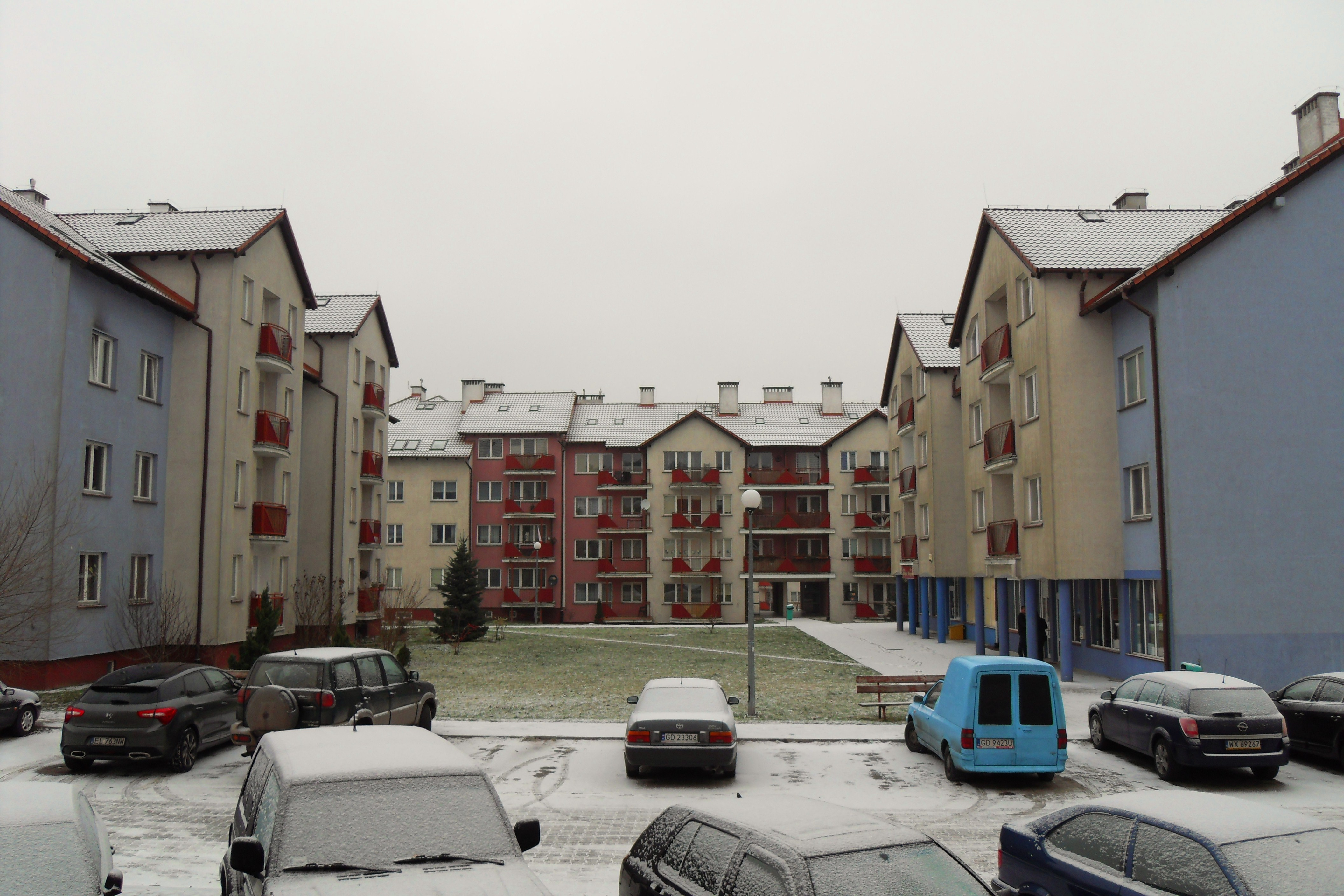 Gdańsk Osowa, ul. Orfeusza (od lewej) 44 i 46; 38, 36 i 34; 40 i 42.